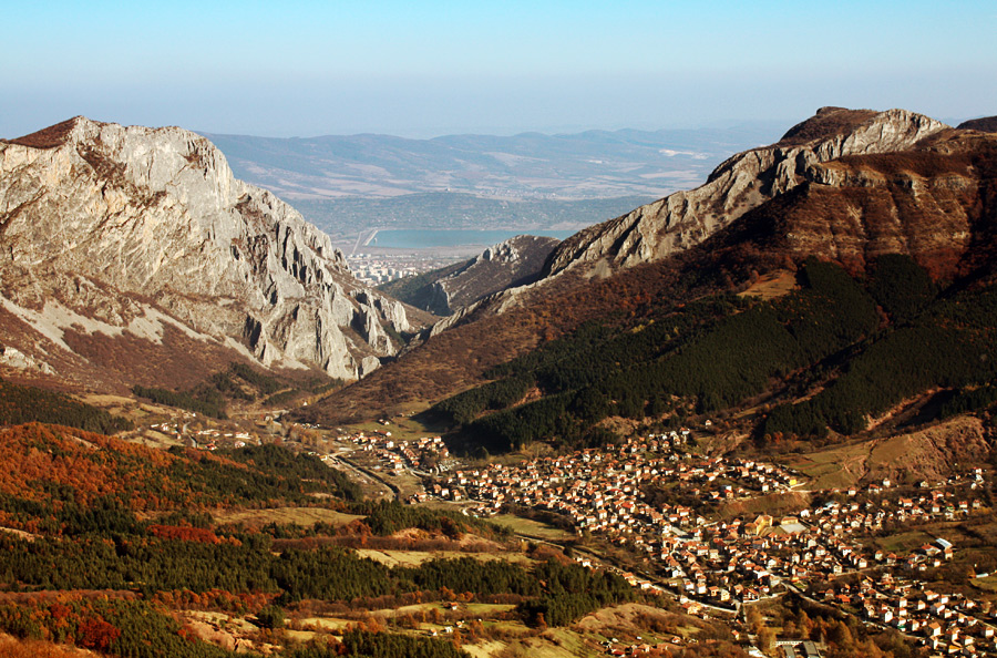 Вратцата и село Згориград